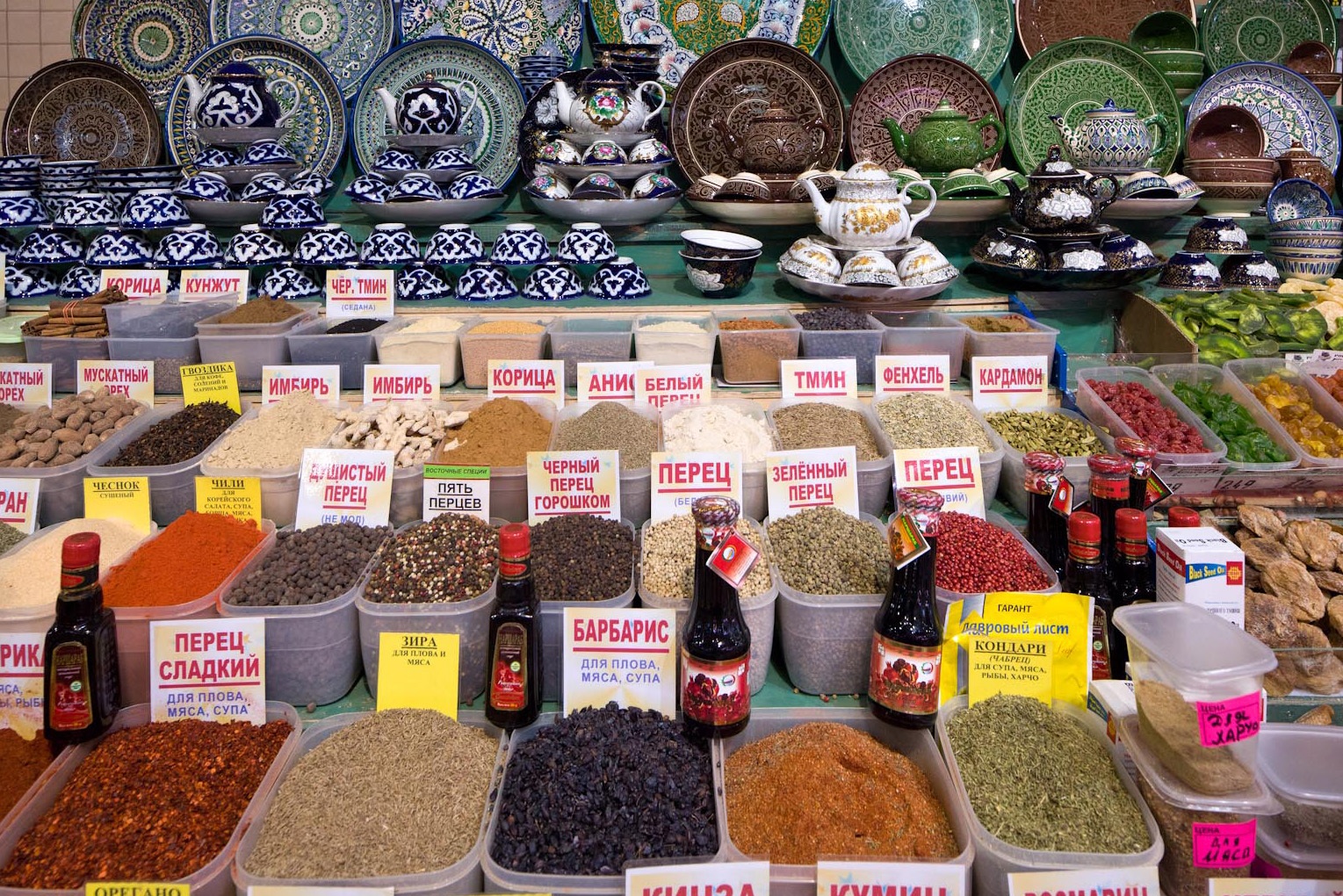 Фермерские ряды на Рогожском рынке_1